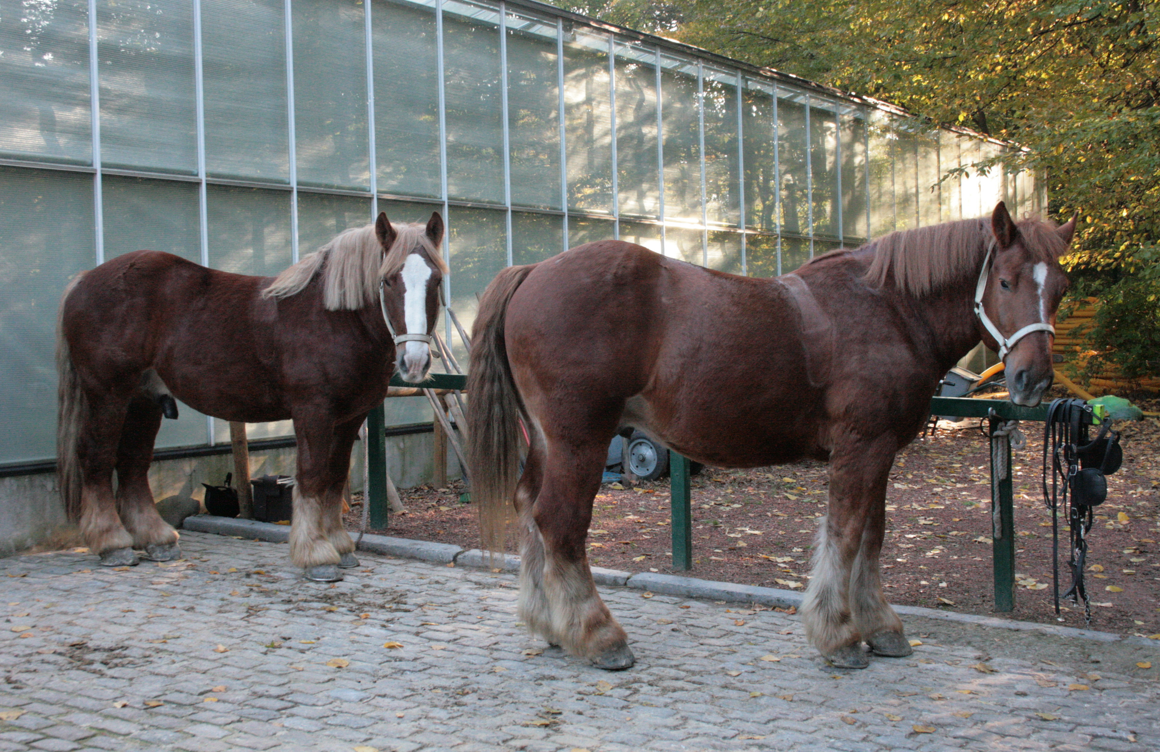 Parc Josaphat, Schaerbeek (Bruxelles), Belgique. Chevaux de trait ardennais utilisés par le Service Propreté de la commune pour collecter les déchêts